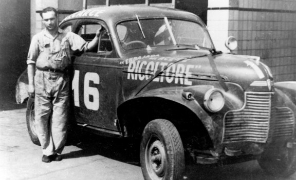 Fangio en sus épocas de TC (1940-1949)